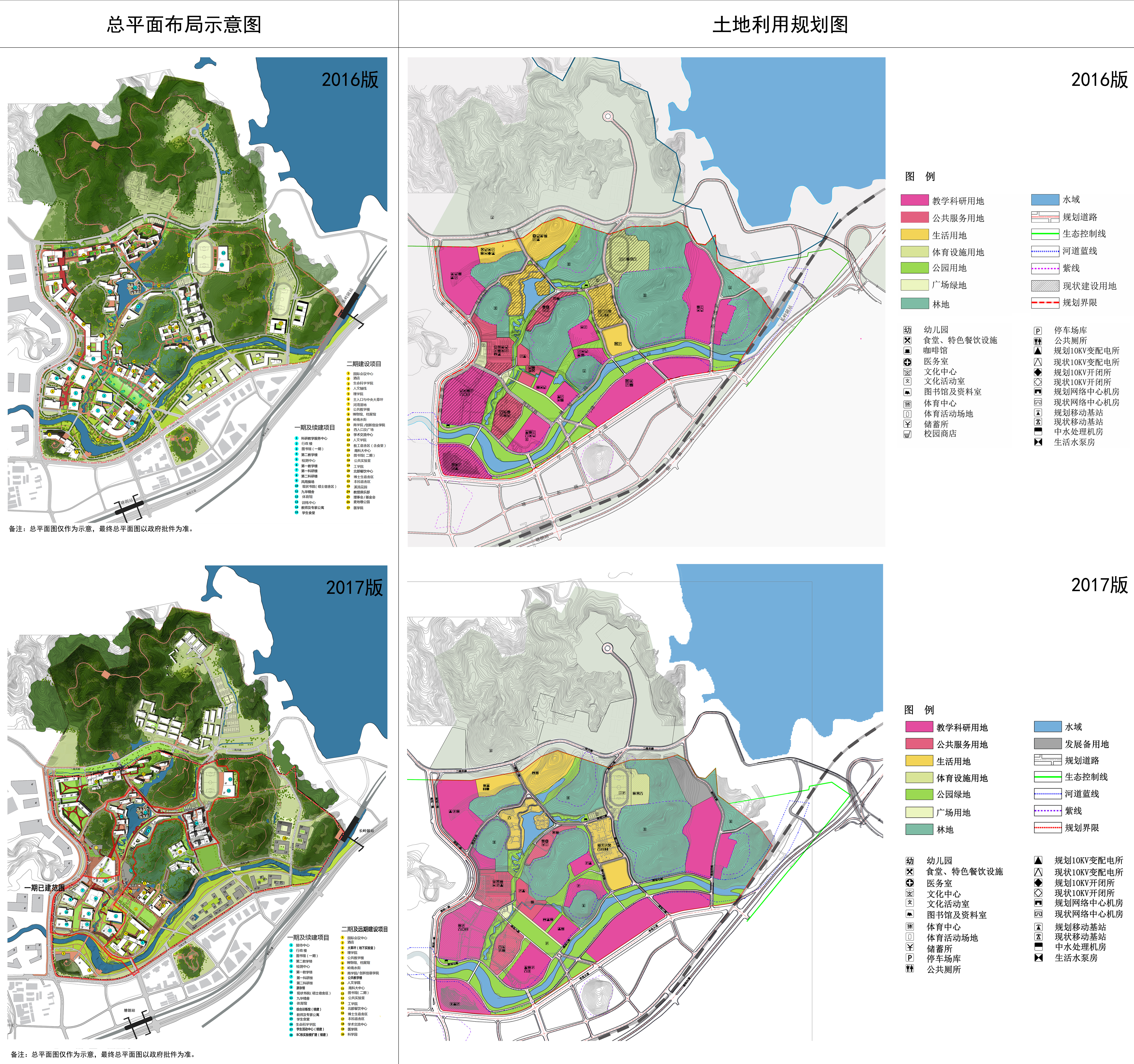 南方科技大学校园规划平面图 (2016&2017) 目前实际的施工方案为下方的2017版方案